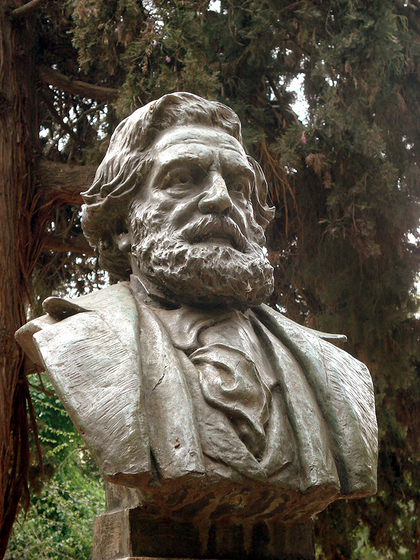 Herma ao Barão de Santo Ângelo (Manuel de Araujo Porto Alegre), na Praça da Alfândega, em Porto Alegre, Brasil.